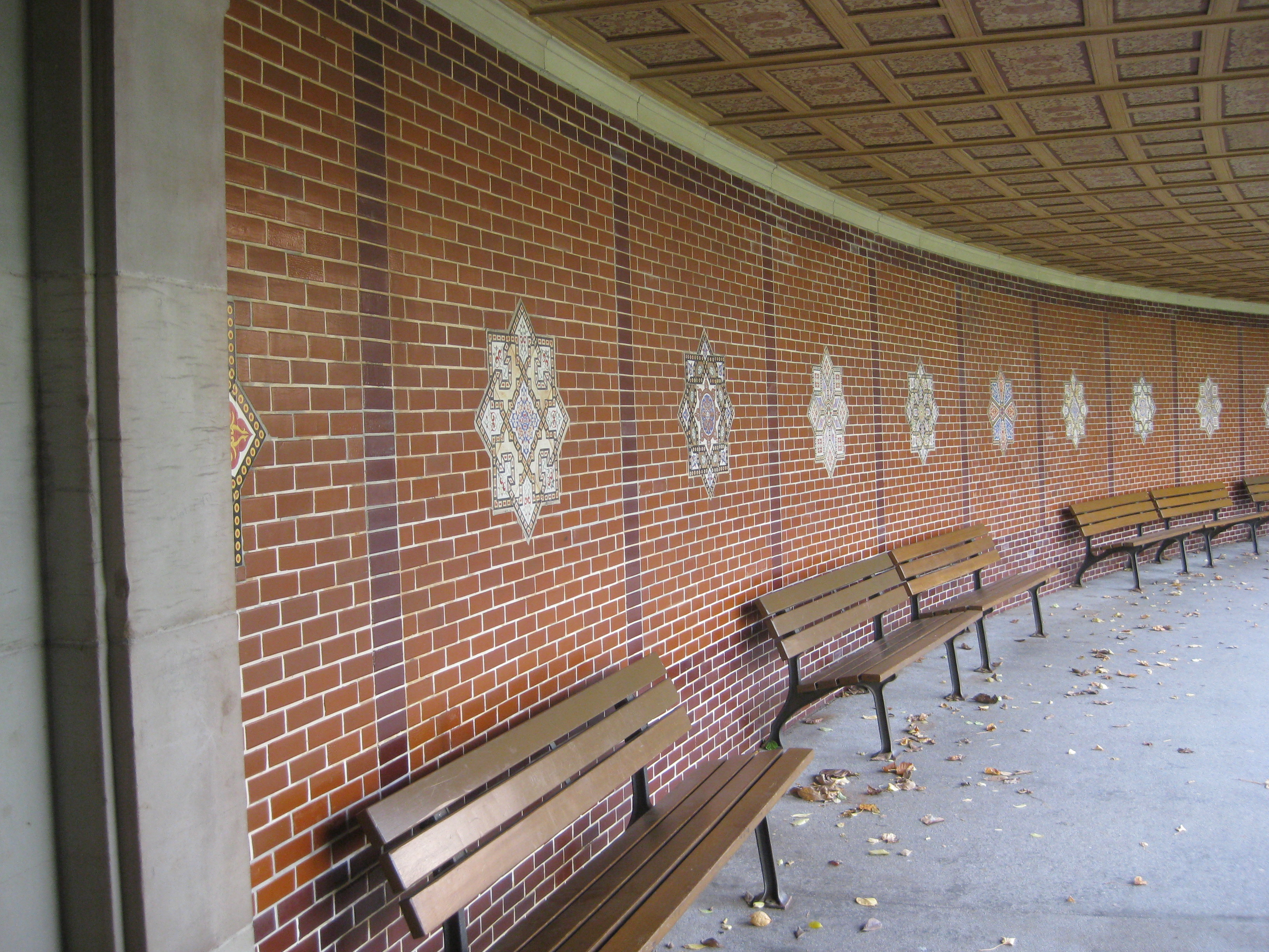 Karl Ludwig von Zanth: Wandelgang im inneren Maurischen Garten, Blick in den südlichen Bogengang. Entstehungsjahr 1847/1848, Stuttgart, Wilhelma. Die Fliesensternpaneele folgen im Südbogen fortlaufend aufeinander. Bei den geraden Teilen des Wandelgangs alternieren sie hingegen mit Blindfensternischen und Blindtüren.